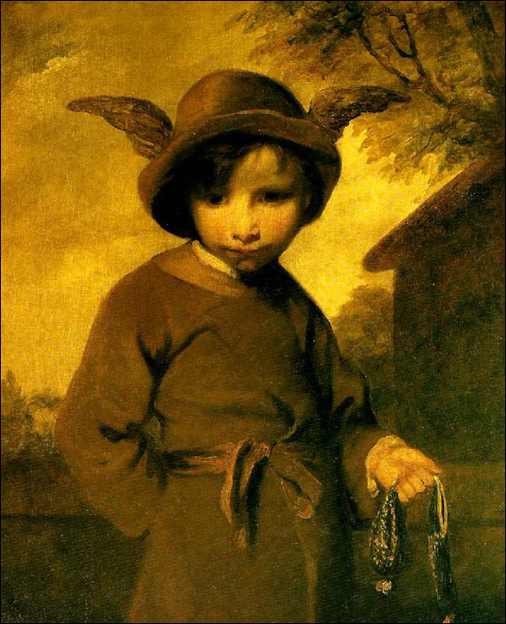 Faringdon Collection Trust. This painting is paired with an another allegorical subject using children: Cupid as Link Boy. In this pair, Reynolds mocked the tradition of children representing classical subjects by placing his children in the streets of London, infused with sexual undertones. Mercury was a messenger as well as the god of commerce and was often depicted with a money bag. Here, he has stolen it.